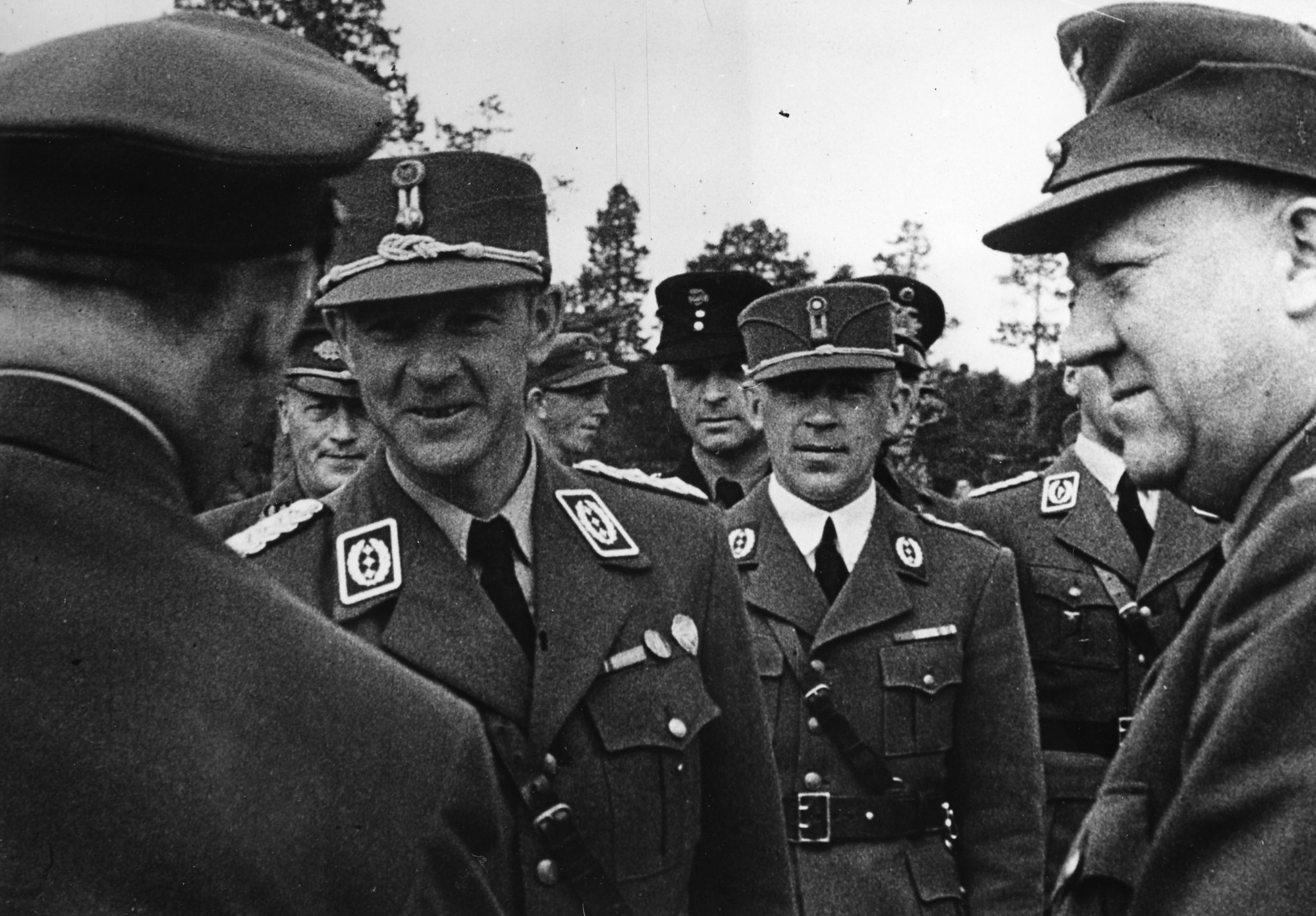 Vidkun Quisling inspiserer Arbeidstjenesten (AT) sammen med en del offiserer fra Arbeidstjenesten. Bildet er fra besøk i AT-leir under Quislings reise til Nord-Norge sommeren 1943 – jamfør filminnslag i Filmavisen nummer 63 (1943). AT-offiseren fremst har graden «brigadefører». Ifølge Arbeidstjenestens organisasjon i Norge 1940–1945 hadde Nordland arbeidsfylking tre leire i Hattfjelldal 1941–1945. (Nakken tilhører trolig Johan Andreas Lippestad, NS' sosialminister som var med i reisefølget.) Ifølge Lars Borgersruds Like gode nordmenn? Den norske militærfascismens historie Bind II viser bildet Hedmark-kapteinen og brigadefører i AT Mikael Gaalaas (offiseren foran, se omtale av Mikal Gaalaas i Store norske leksikon) og forvaltingssjef Arne Tonning Sunde (bak til høyre) ved en inspeksjon i AT i 1944. RA/PA-1209/Ue 96/img089 Nasjonal Samling, forkortet NS, var et norsk politisk parti som ble grunnlagt av Vidkun Quisling i 1933 og ble oppløst ved frigjøringa i 1945. Ideologisk fulgte partiet den tyske nasjonalsosialismen, og NS ble støtteorganisasjon for den tyske okkupasjonsmakta i Norge under andre verdenskrig.